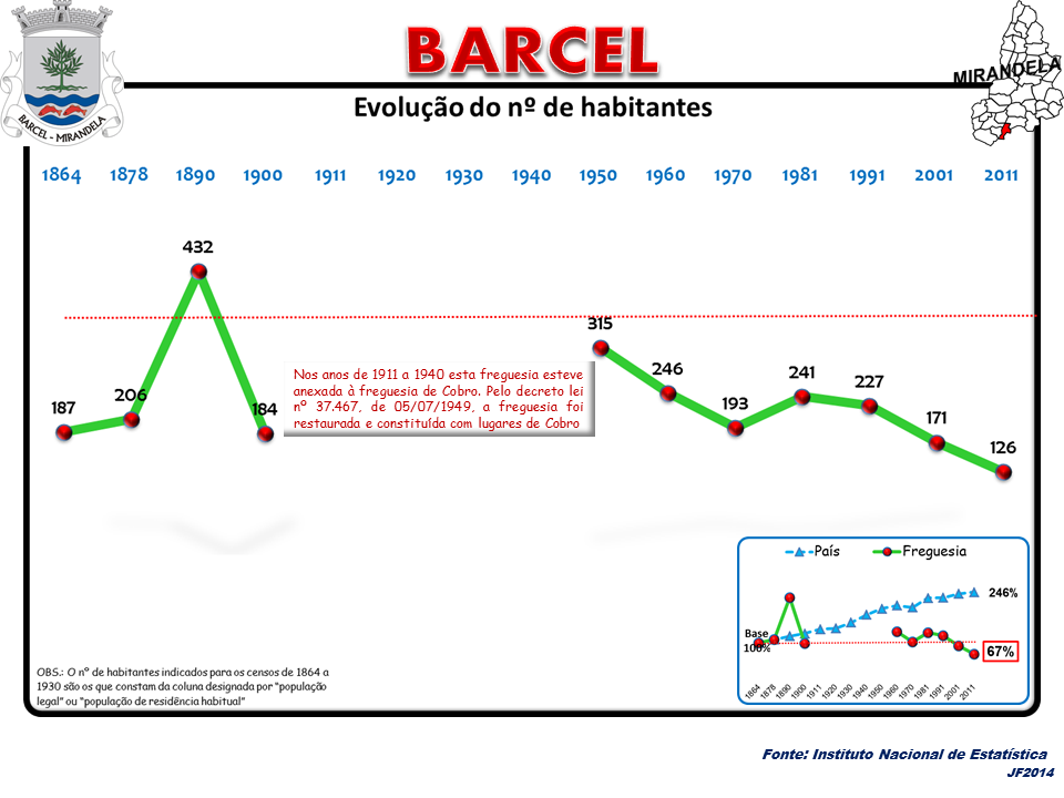 Evolução da População 1864 / 2011